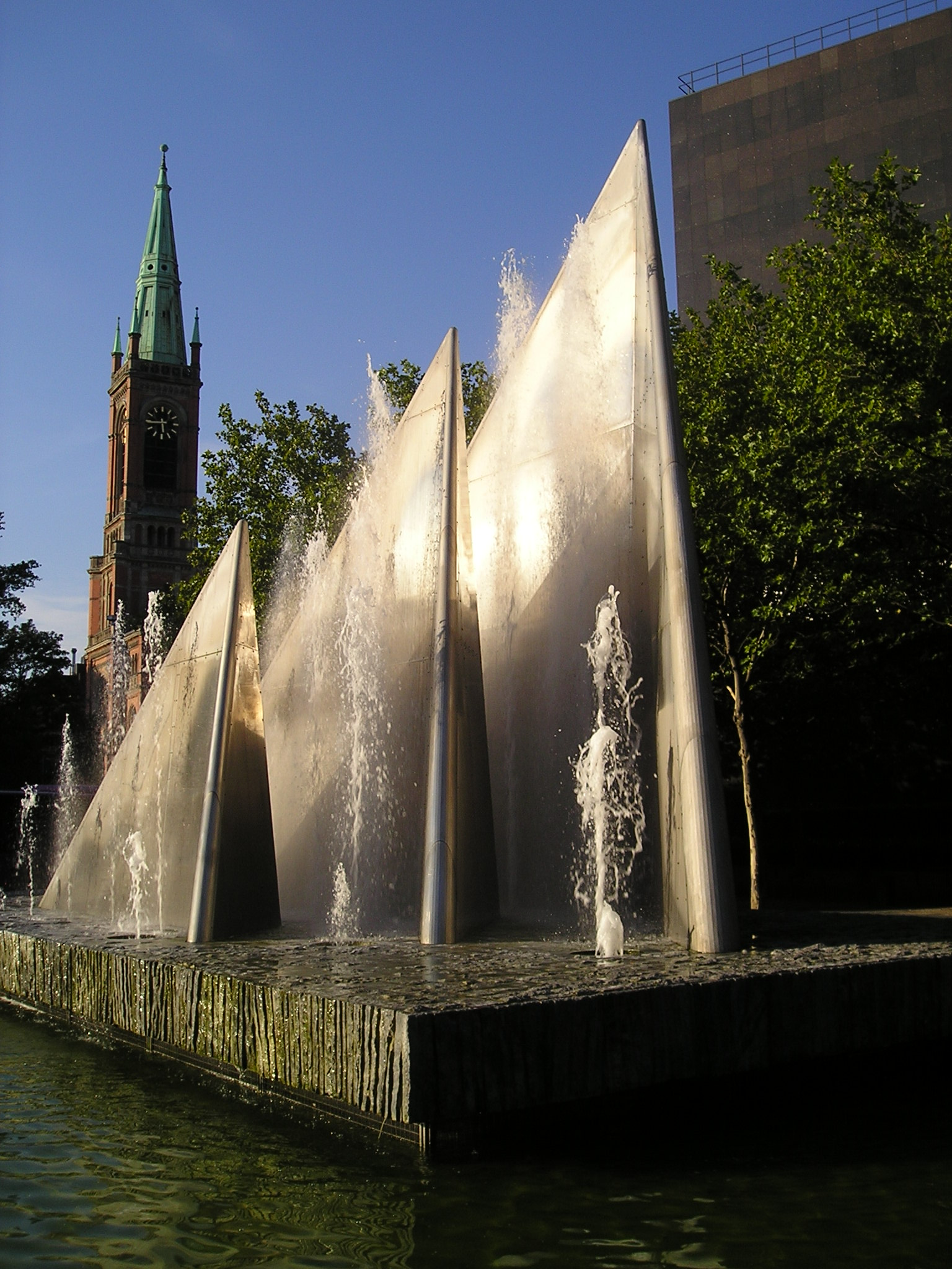 Platz der Deutschen Einheit mit Brunnen, im Hintergrund Turm der Johanneskirche